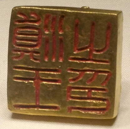 “滇王之印”金印，1955年-1960年出土于云南省晋宁石寨山